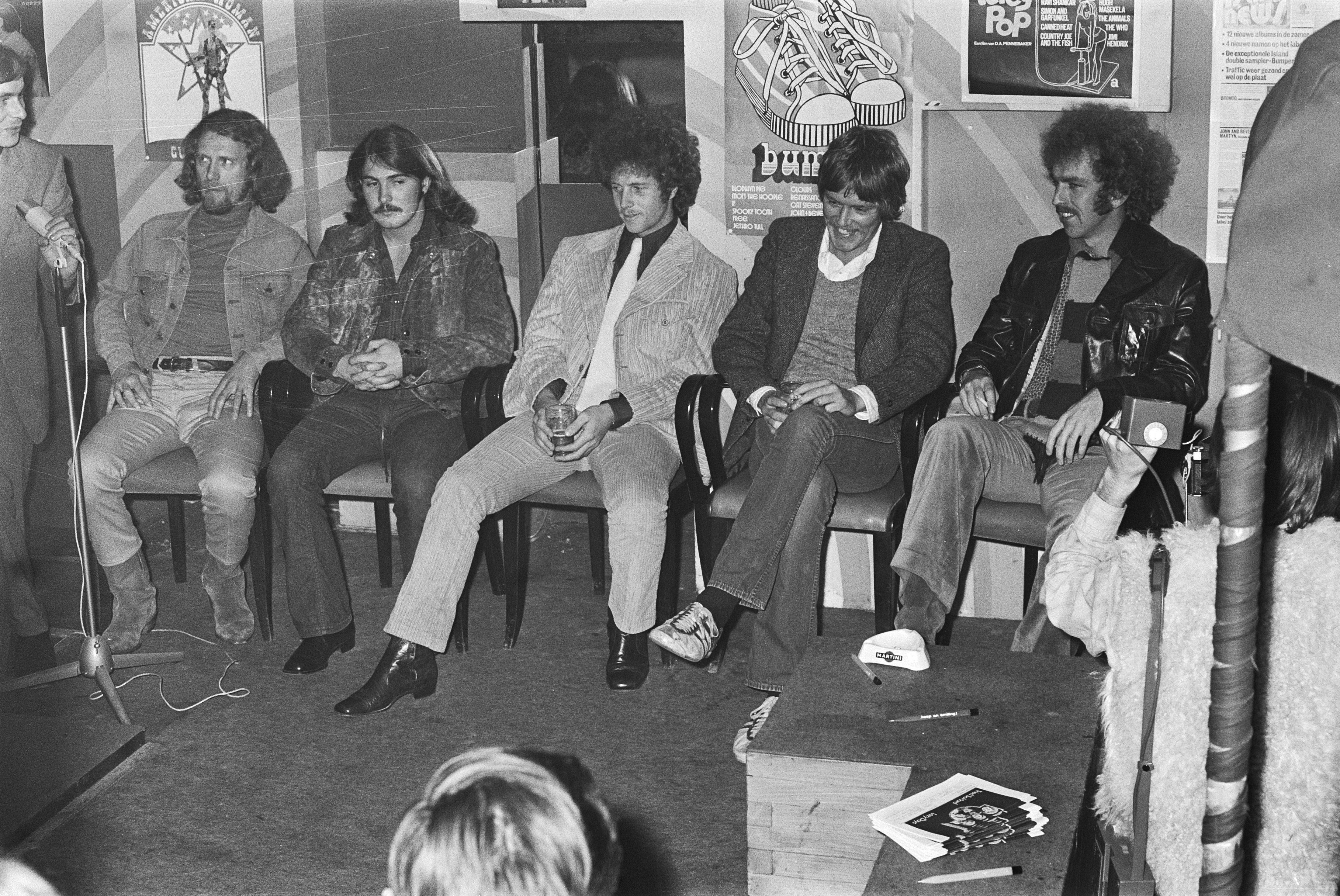 Collectie / Archief : Fotocollectie Anefo Reportage / Serie : [ onbekend ] Beschrijving : Amerikaanse popgroep Flying Burrito Bros in Birdsclub, Amsterdam; persconferentie. Left to right: Sneaky Pete Kleinow, Rick Roberts, Chris Hillman, Michael Clarke, Bernie Leadon Datum : 23 november 1970 Locatie : Amsterdam, Noord-Holland Trefwoorden : Popgroepen, persconferenties Fotograaf : Croes, Rob C. / Anefo Auteursrechthebbende : Nationaal Archief Materiaalsoort : Negatief (zwart/wit) Nummer archiefinventaris : bekijk toegang 2.24.01.05 Bestanddeelnummer : 924-0359